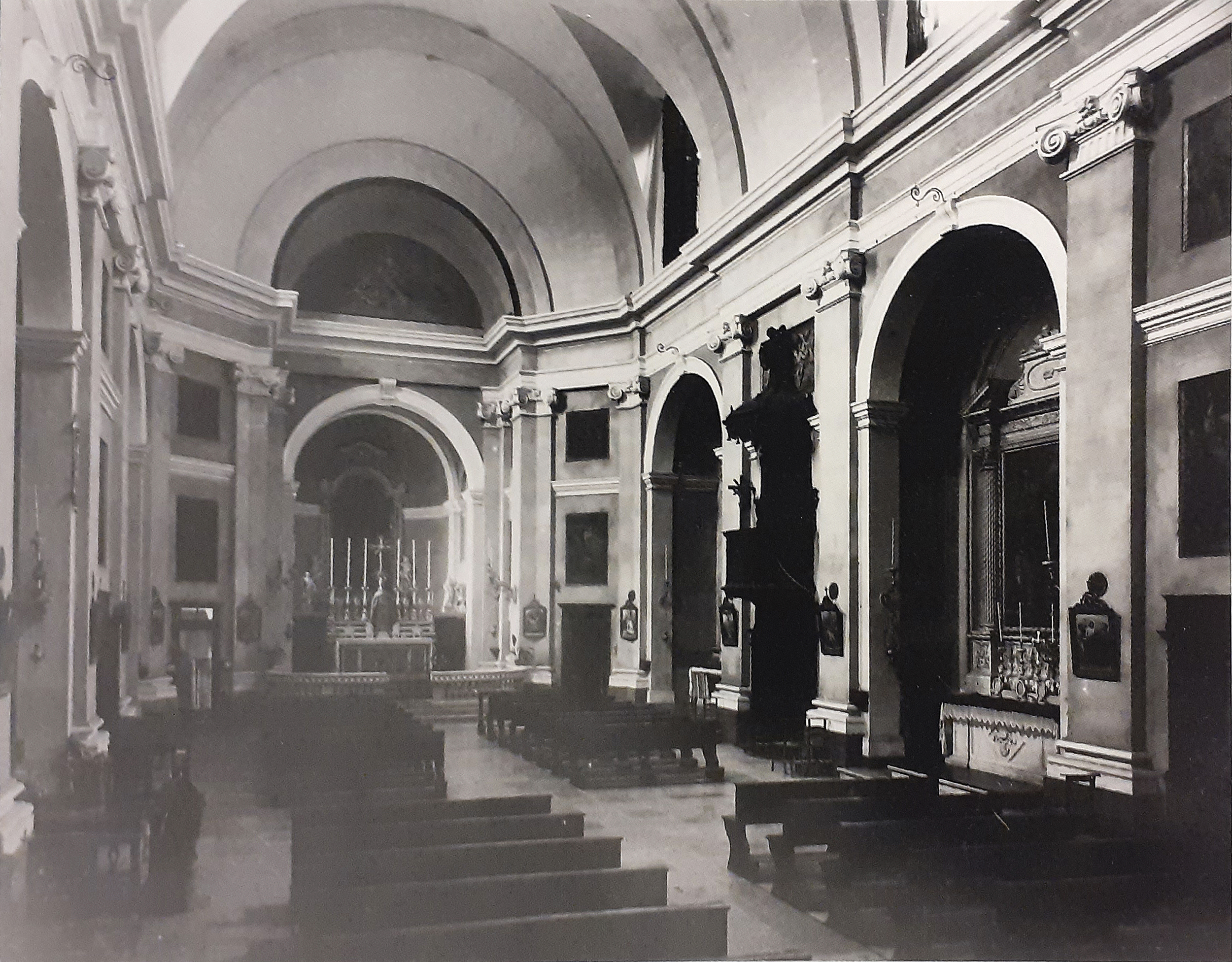 La chiesa di S. Pietro Incarnario prima delle trasformazioni post-seconda guerra mondiale